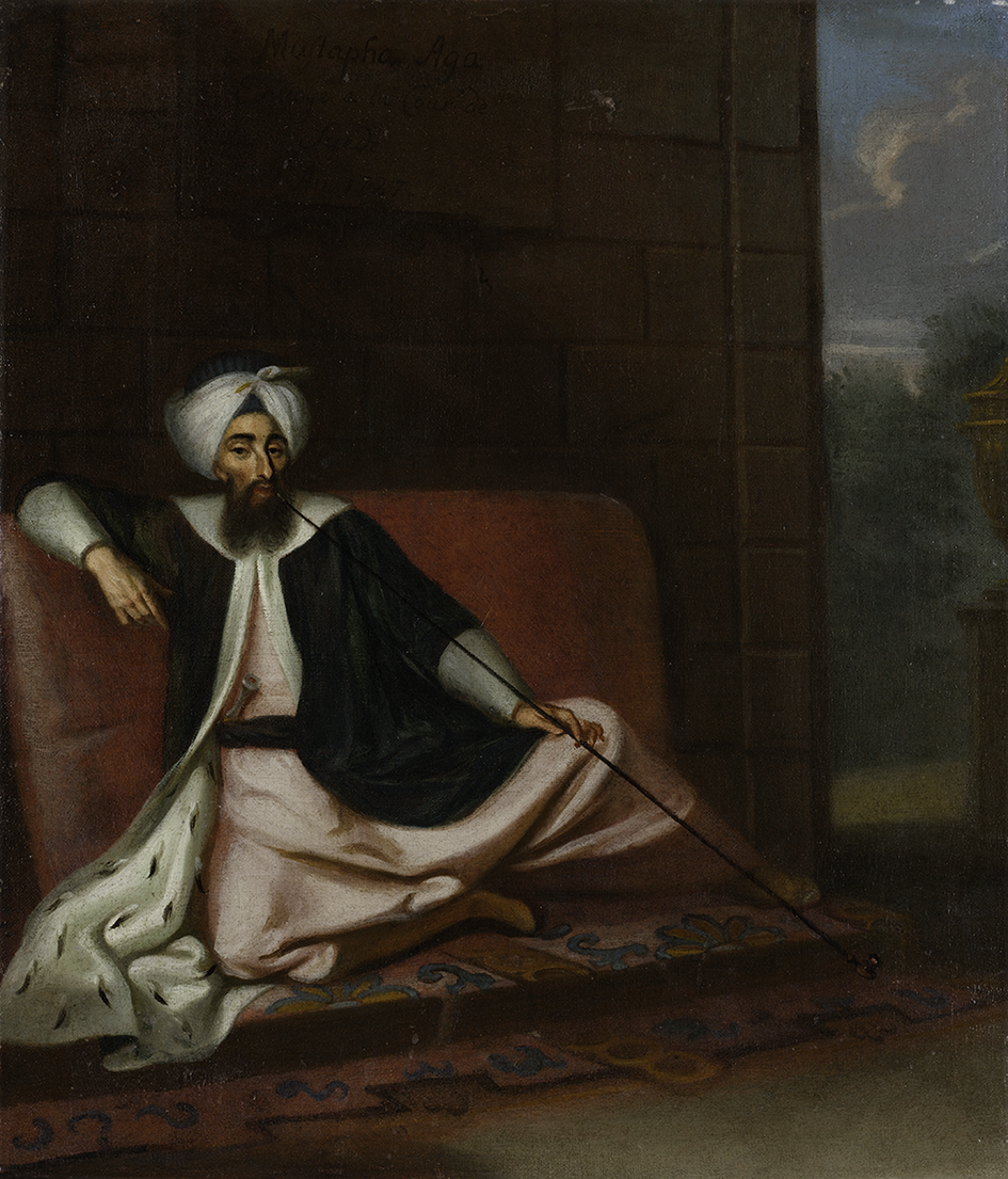 George Engelhardt Schröder’den, Tuval üzerine yağlı boya, 39x 45 cm